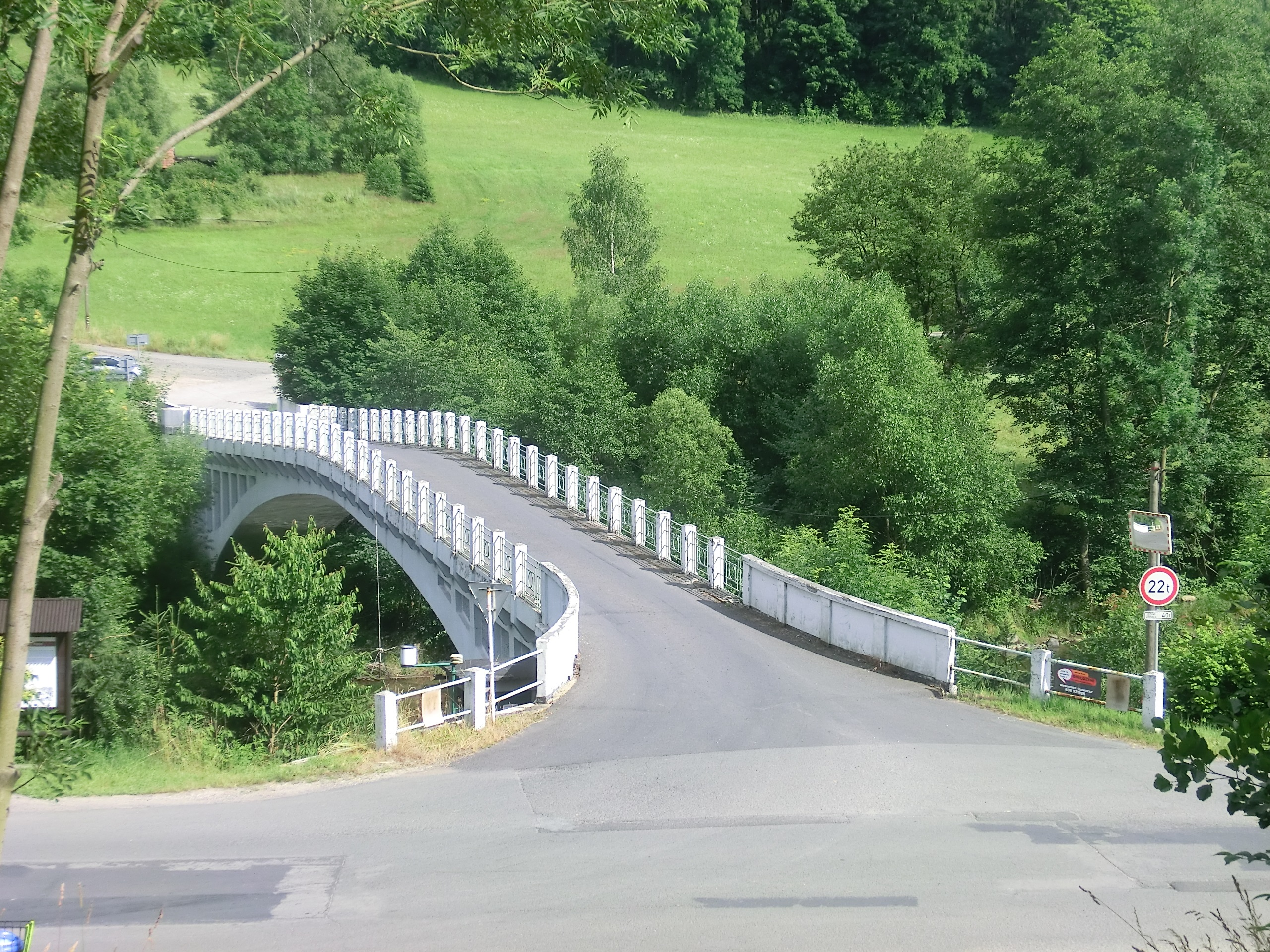 Betonový klenutý most spojuje Peřimov a Mříčnou s hlavní silnicí do Semil od roku 1910.